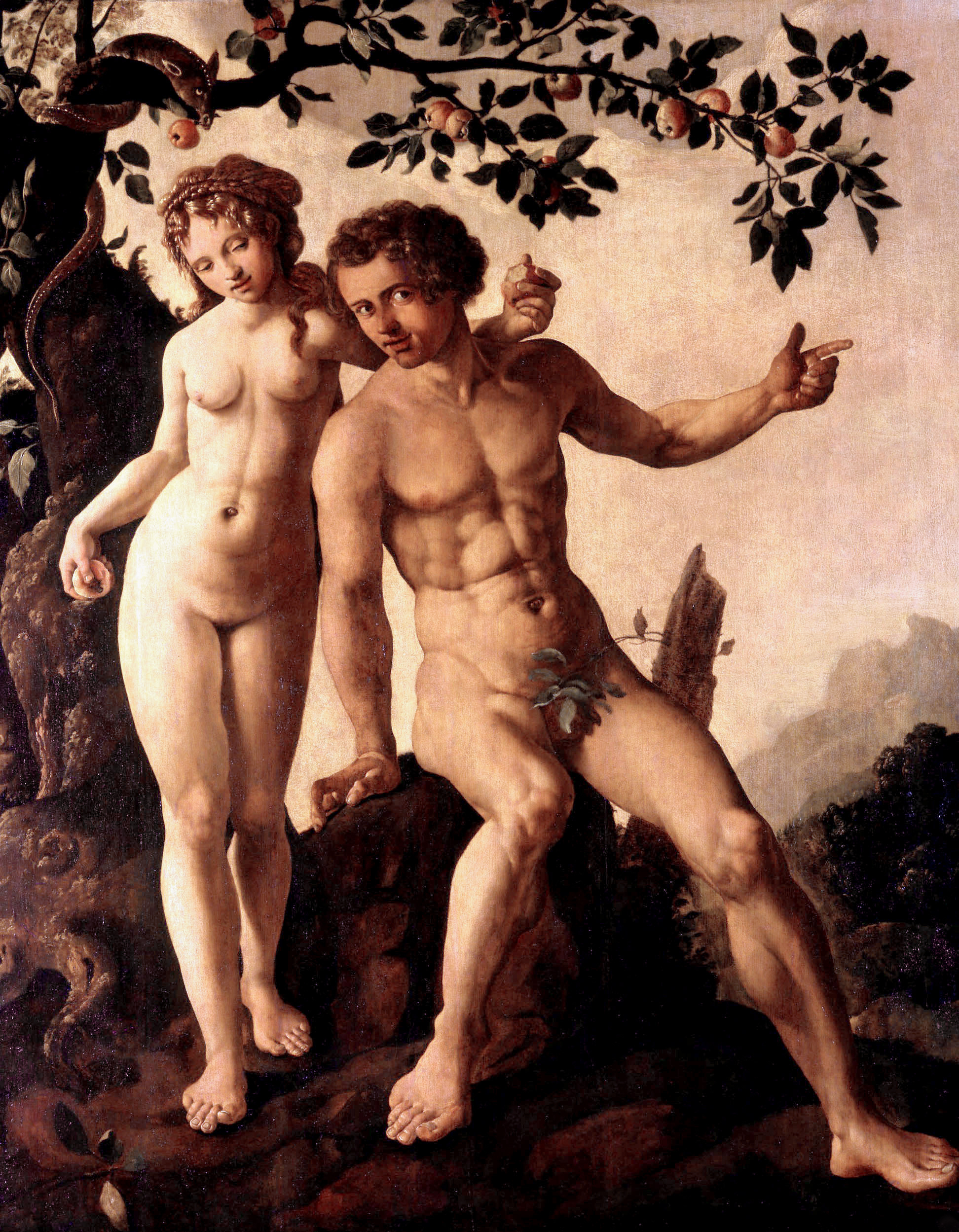 De zondeval